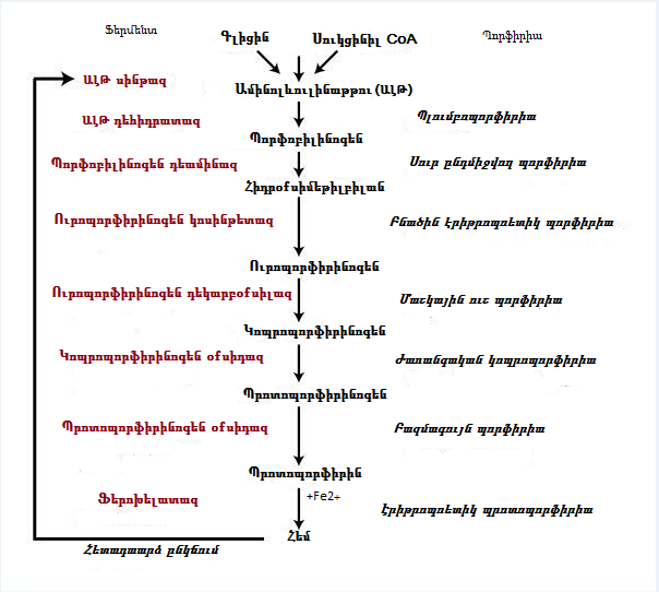 Պորֆիրիաների առաջացումը և համապատասխան ֆերմենտատիվ դեֆեկտը